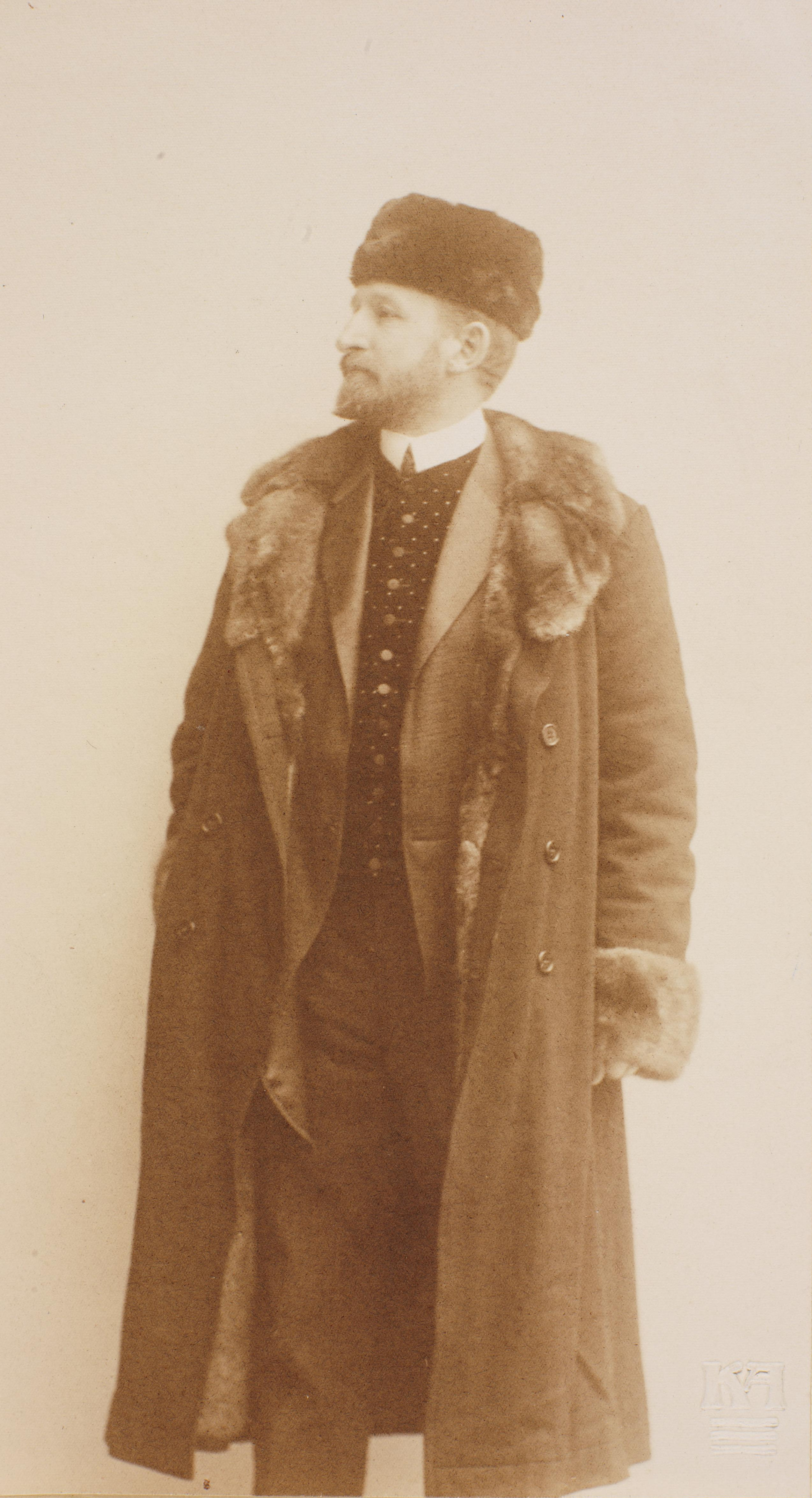 Bildet er hentet fra Nasjonalbibliotekets bildesamling Depicted person: Mjøen, Jon Alfred